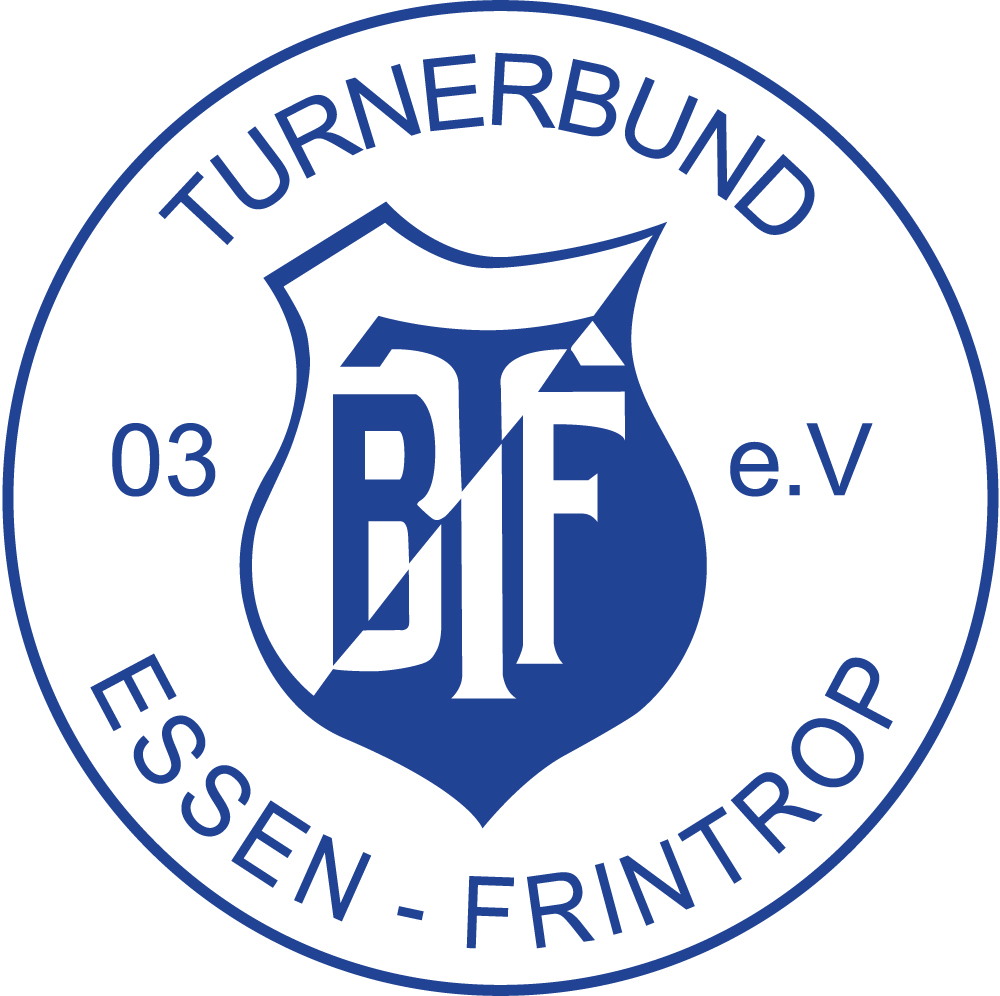 Wappen des Sportvereins Turnerbund Essen-Frintrop 1903 e.V.